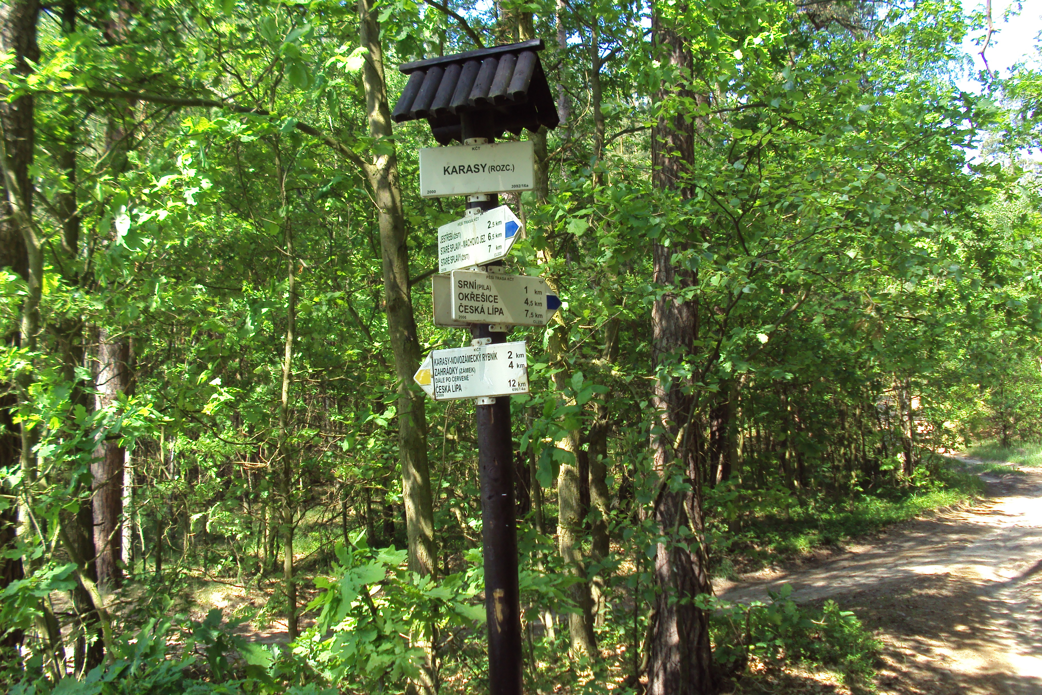 Rozcestník Karasy, katastr Provodín, již mimo obec, žlutá s modrou